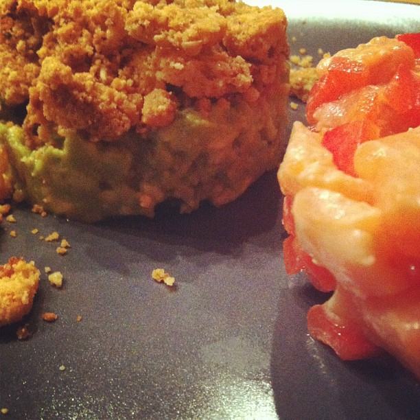 Merci Nat pour ce repas ! Tartare de saumon et crumble d'avocat parmesan ... Je reviendrai !